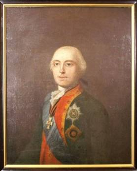 Віктор Амадей фон Ангальт-Бернбург-Шаумбург-Хойм: принц Ангальтський